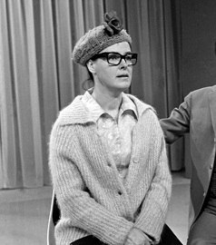 Ina van Faassen, Nederlands actrice en cabaretière.